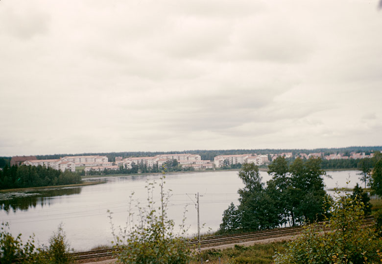 Södergården och Handskerydsjön - Nässjö Motiv: Nässjö Nyckelord: Riksintressen Kategori: Bostadsområde Södergården och Handskerydsjön - Nässjö.